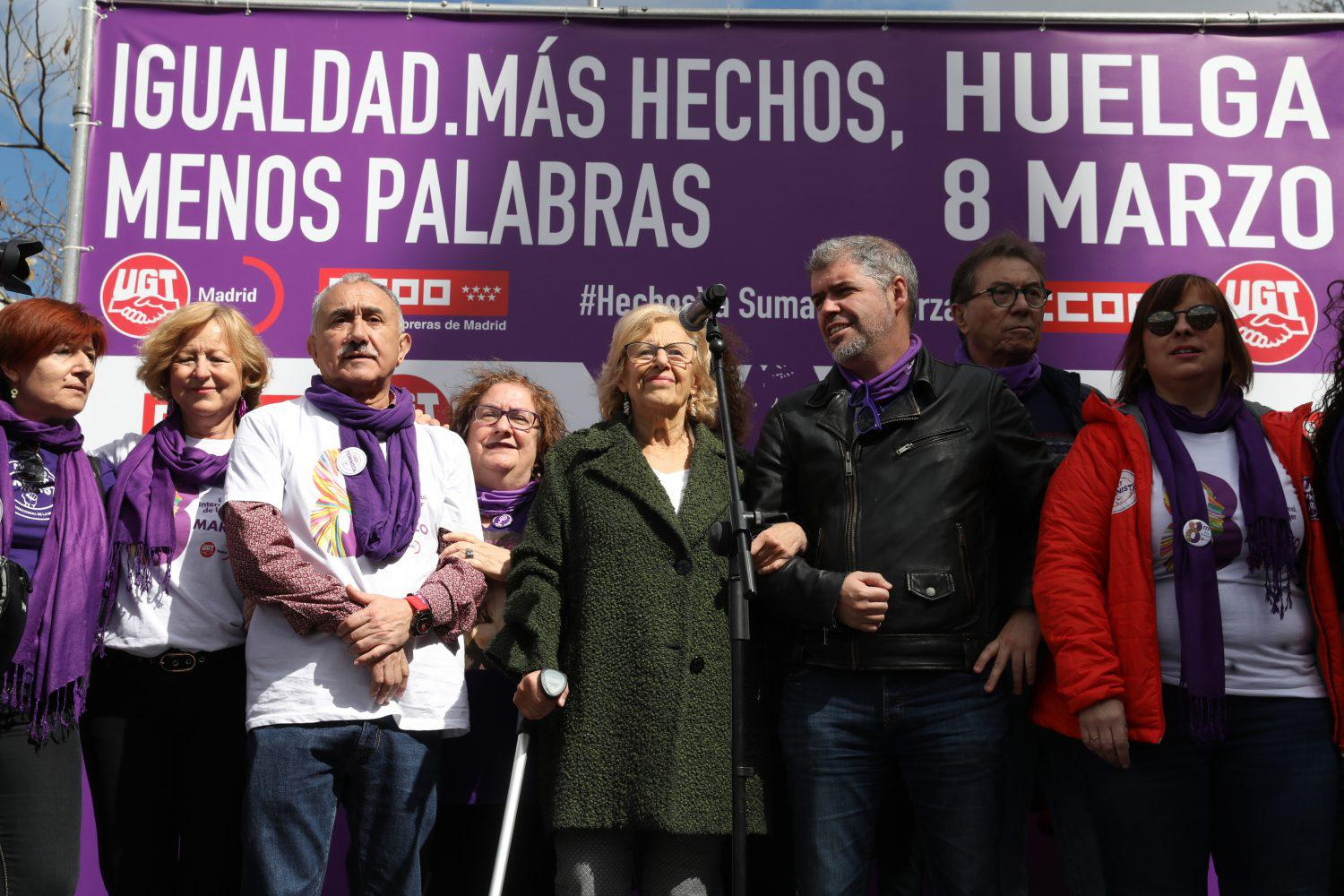 La alcaldesa de Madrid, Manuela Carmena, ha asistido hoy a la concentración que se ha desarrollado en la plaza de Cibeles organizada por los sindicatos mayoritarios para conmemorar el día de la Mujer.